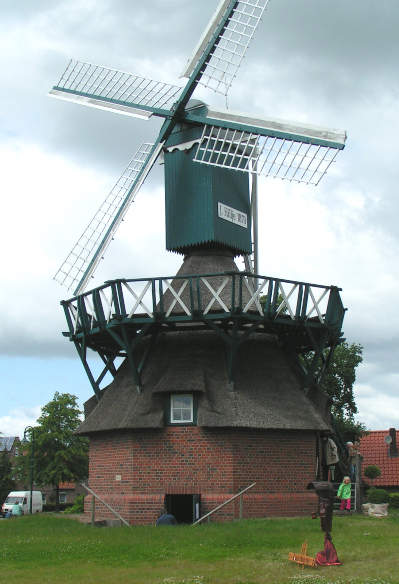 Kokermühle in Edewecht